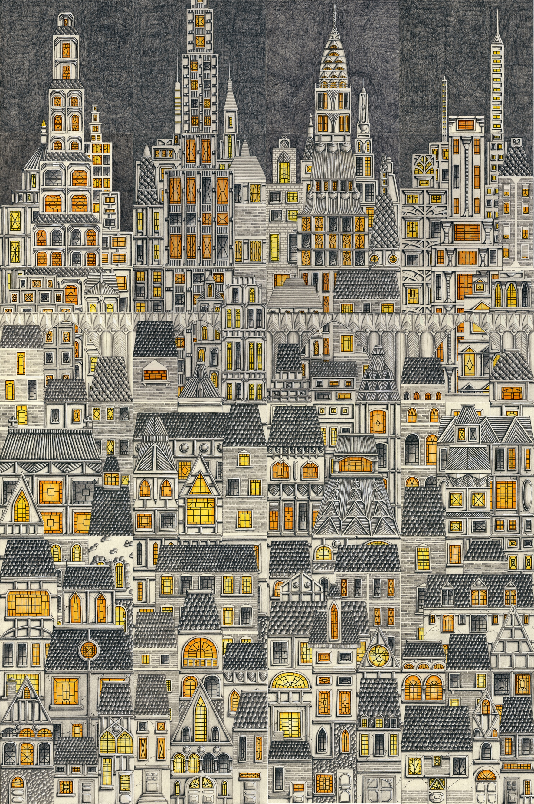 Aitziber Alonsok sortutako irudia: hiri bat gauez